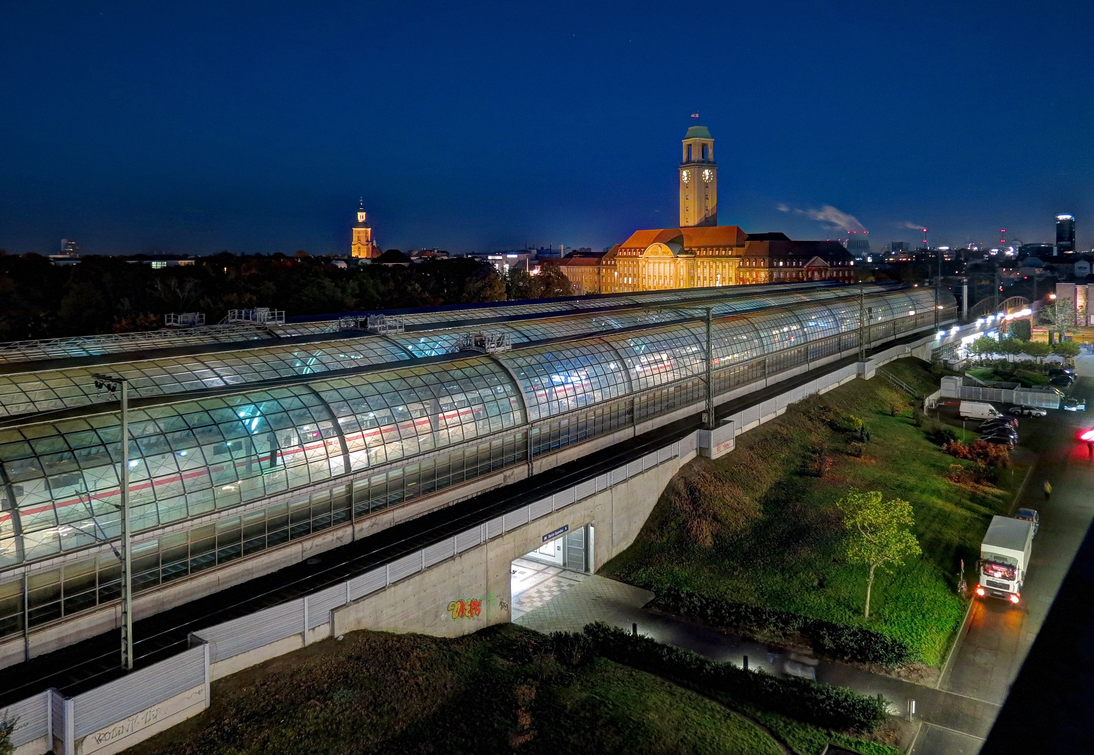 Bahnhof Berlin-Spandau, Bahnhof, Rathaus Spandau - Nachts